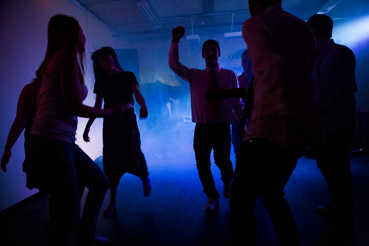 "Beach party" (inomhus) i samband med invigningen av Ungdomens Nykterhetsförbunds lokal i Skarpnäck.